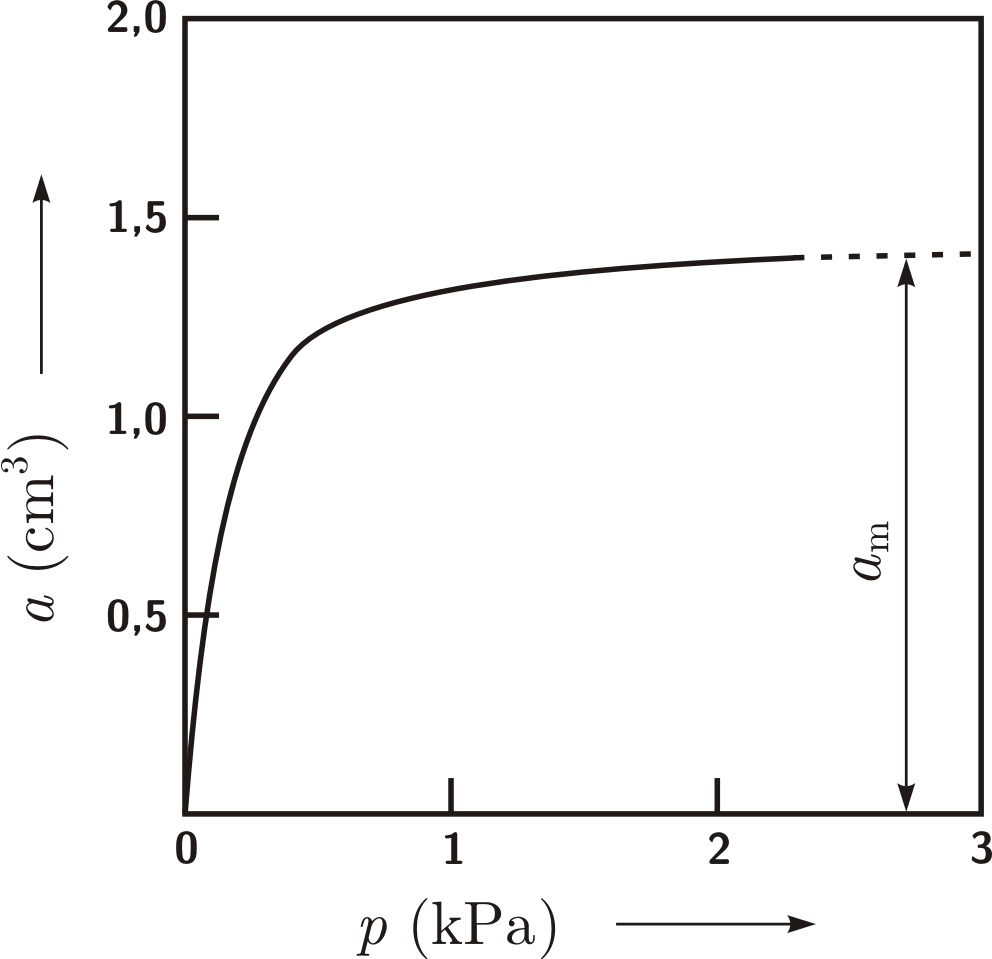 Langmuir isoterm for copper/hydrogene adsorption